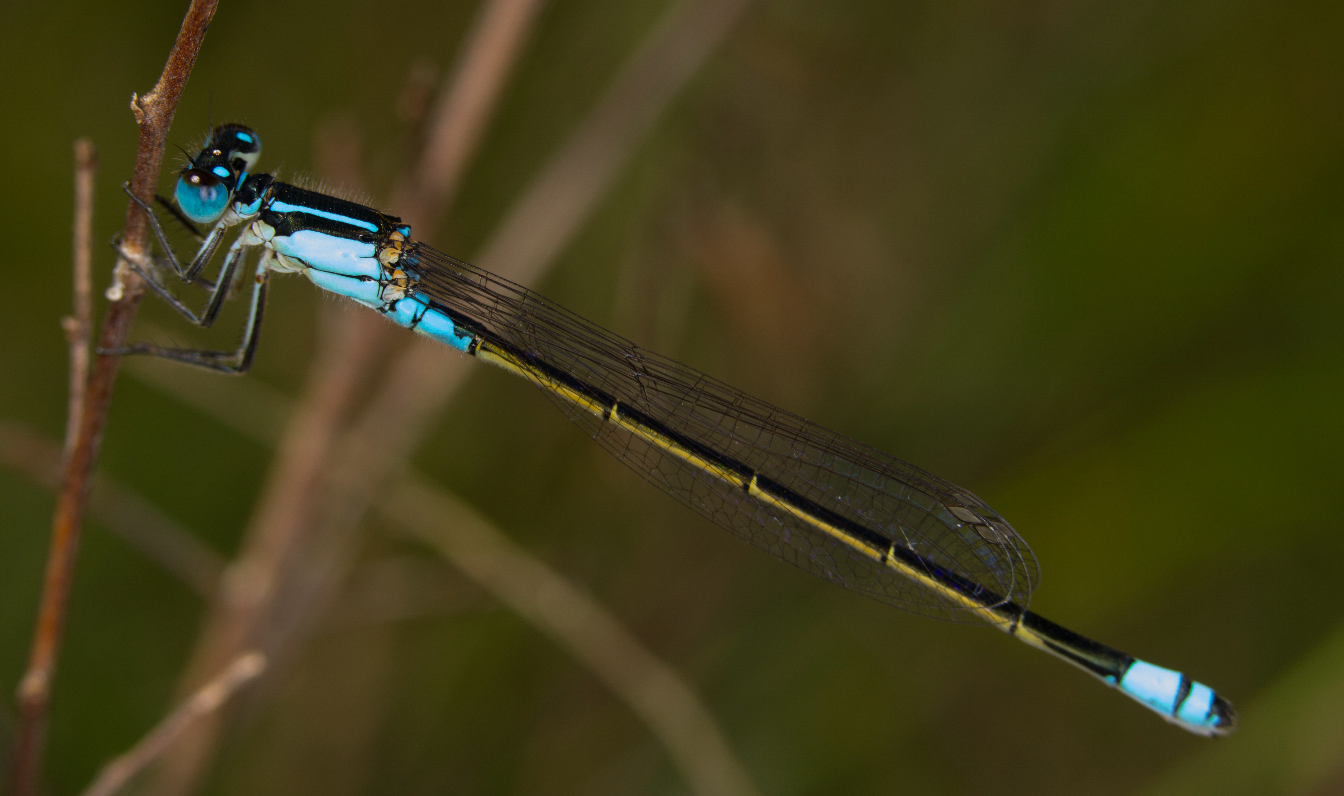 common bluetail damselfly